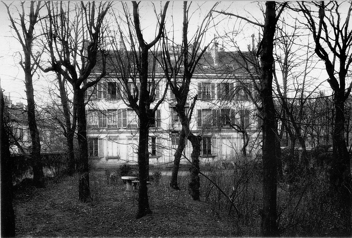 Maison habitée par Victor Hugo de 1827 à 1830, au 27 rue Notre-Dame-des-Champs (ancien n°11).